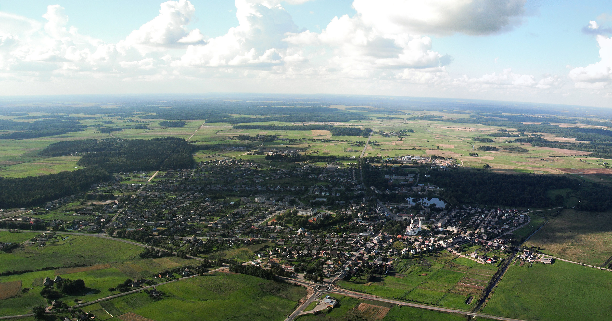 Rietavo panorama 2011-08-14